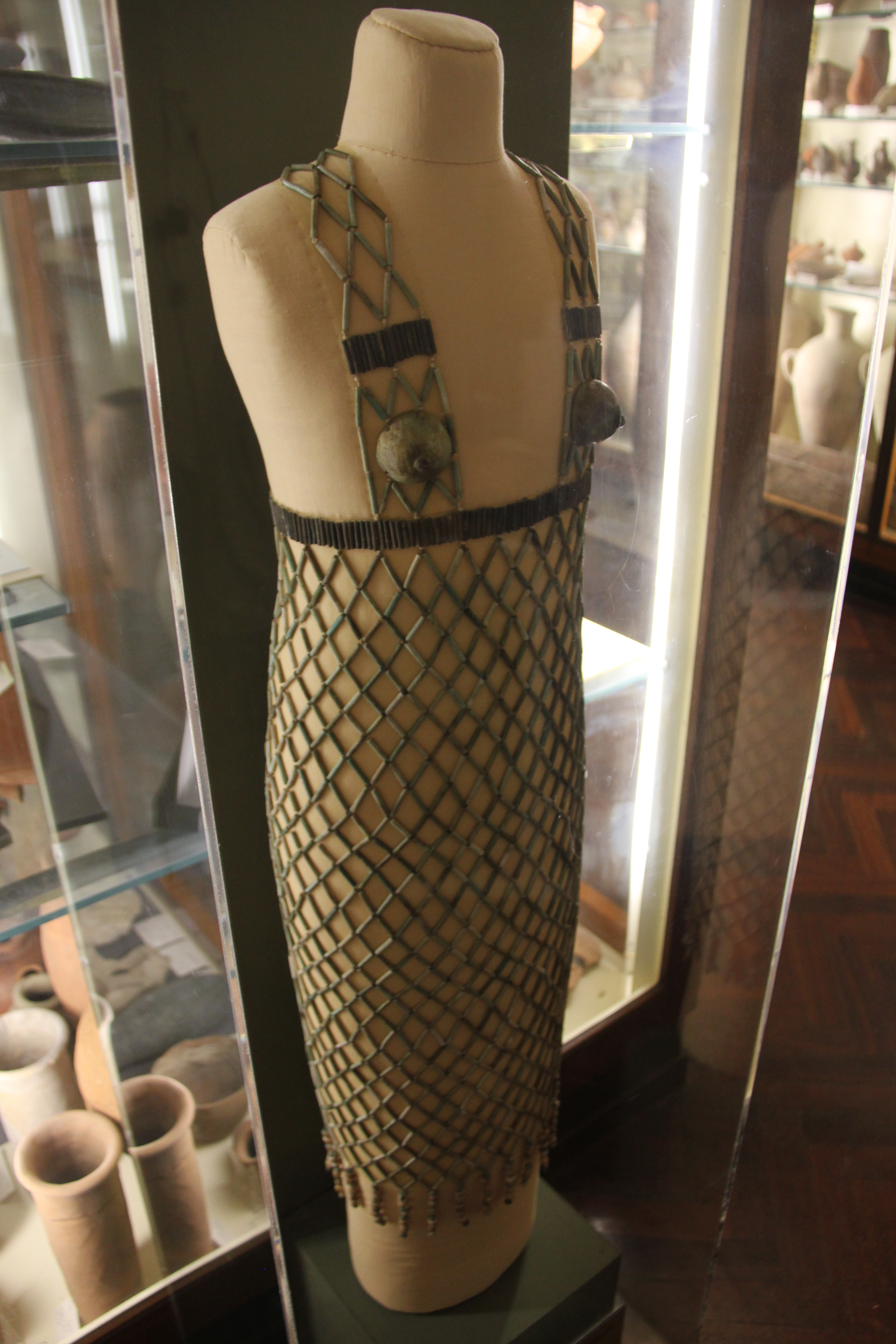 Petrie Museum